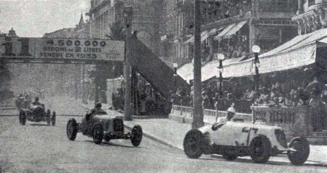 Grand Prix de Nice 1934, au virage du Ruhl.